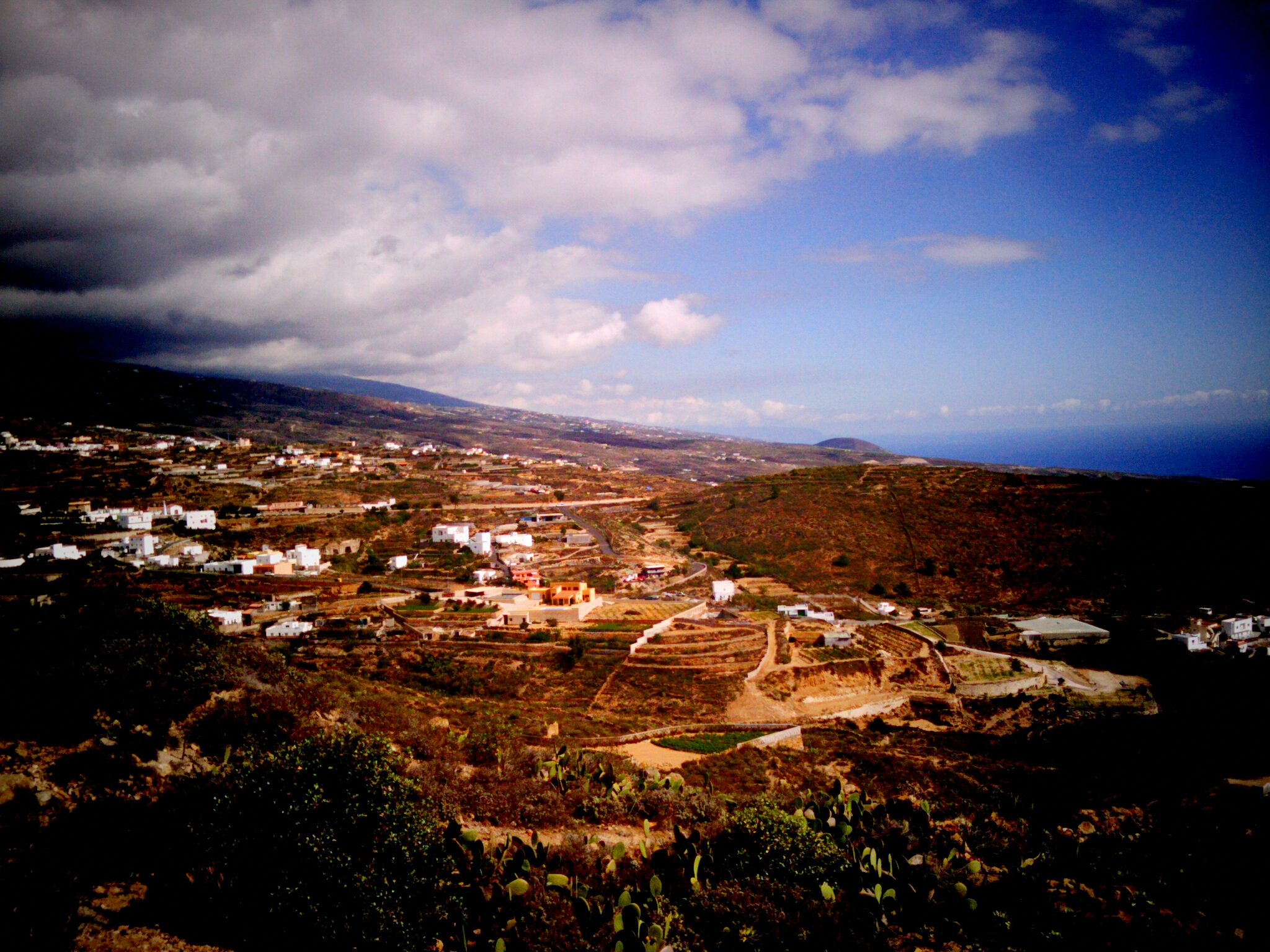 Vista de Arico